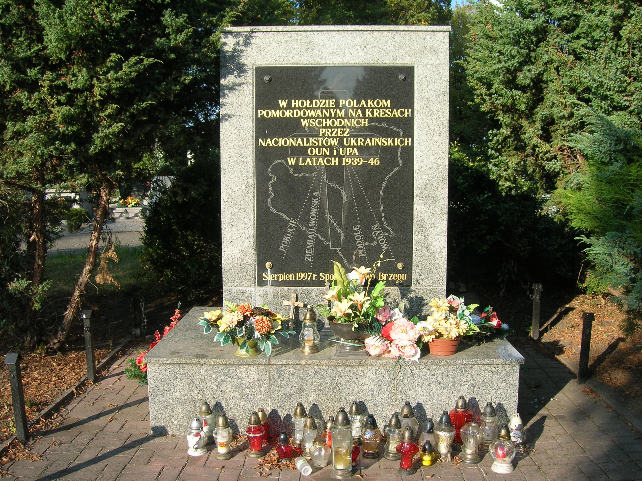 Pomnik w hołdzie Polakom pomordowanych na Kresach przez nacjonalistów ukraińskich OUN i UPA w Brzegu